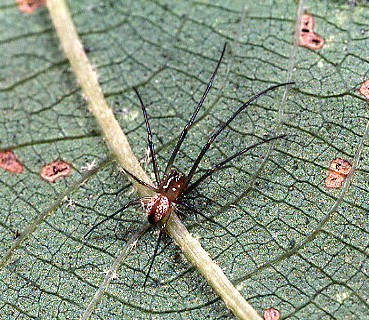 male Okileucauge sasakii from Okinawa.